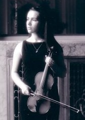 Maria Azova, violinist